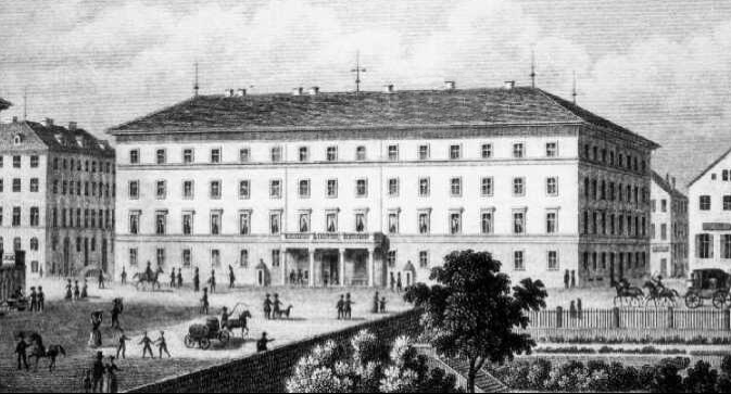 Neue Kanzlei in Stuttgart (heute: Königstr. 44/Kronprinzstr. 5), Stahlstich, nach der Natur gezeichnet v. Friedr. Keller - Stich und Druck b.W.Pobuda